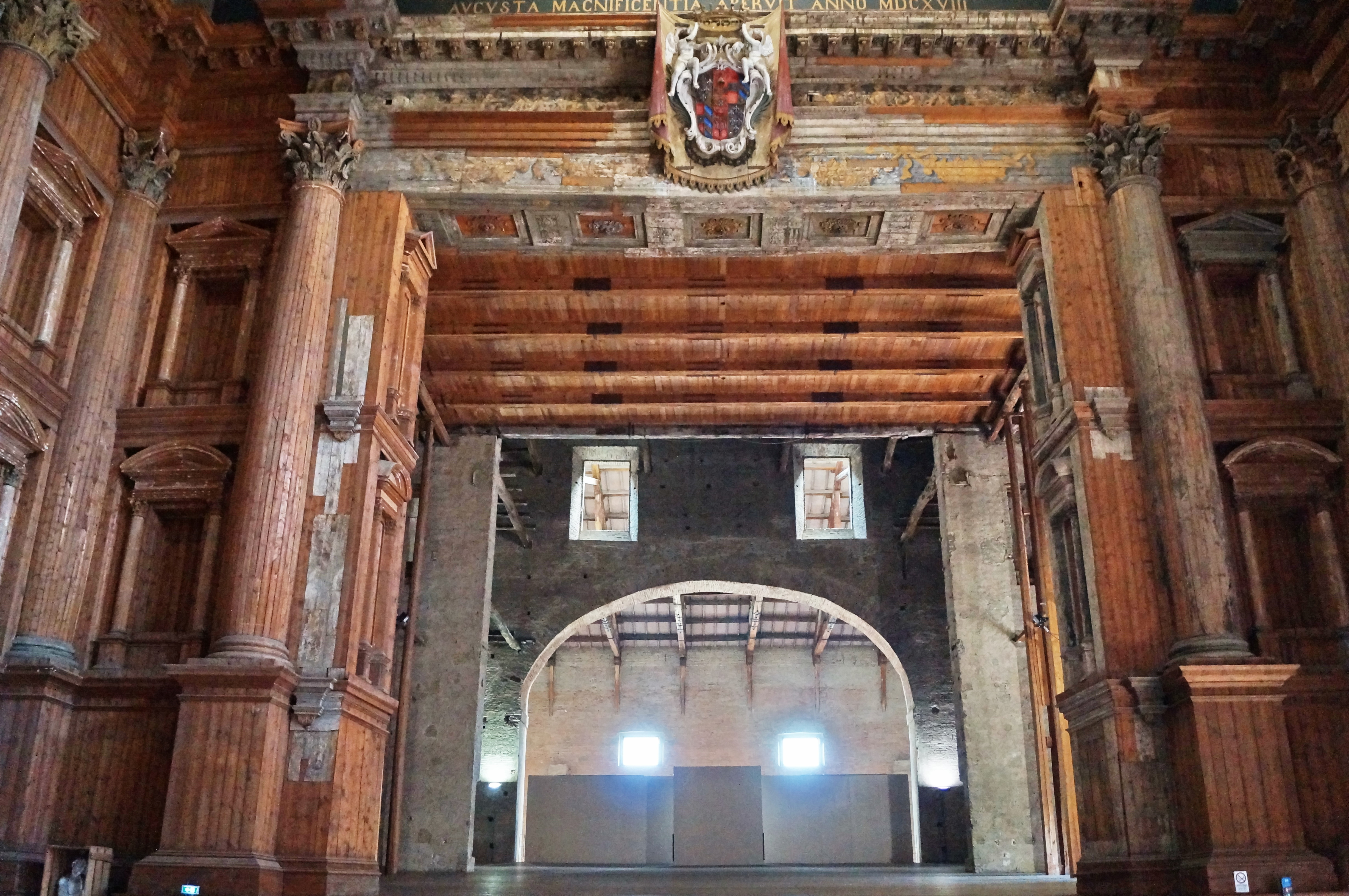 Teatro Farnese This is a photo of a monument which is part of cultural heritage of Italy.